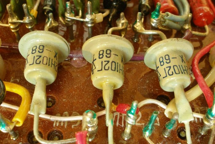 Dinistori 2Н102Г militārās automātikas shēmā.